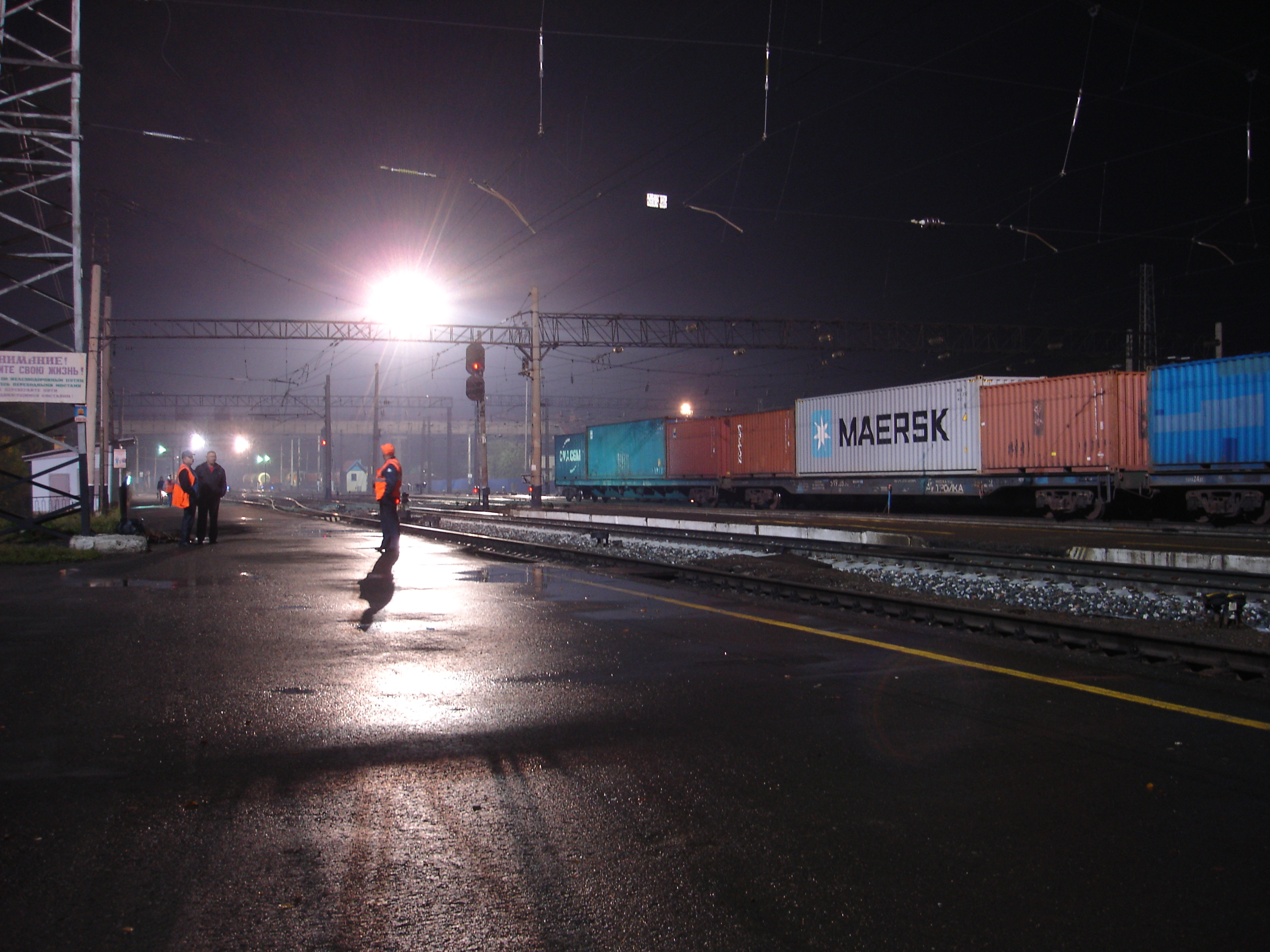 Россия, г. Красноуфимск, Свердловская область. Железнодорожный вокзал. Вид на пути, стоящие вагоны - фиттинговые контейнеры, рабочих.